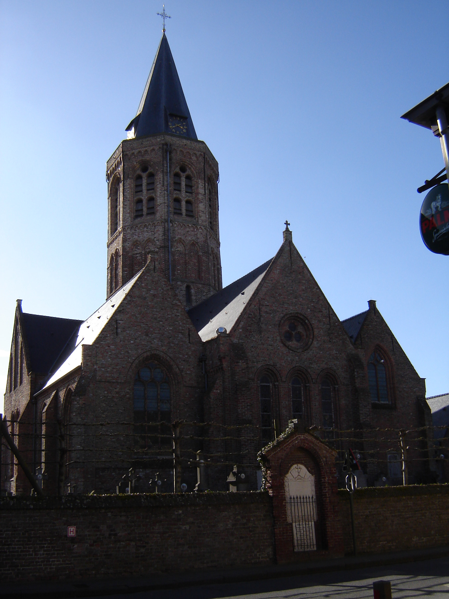 Sint-Jan-de-Doperkerk in Stalhille Church of Saint John the Baptist in Stalhille, Jabbeke, West Flanders, Belgium